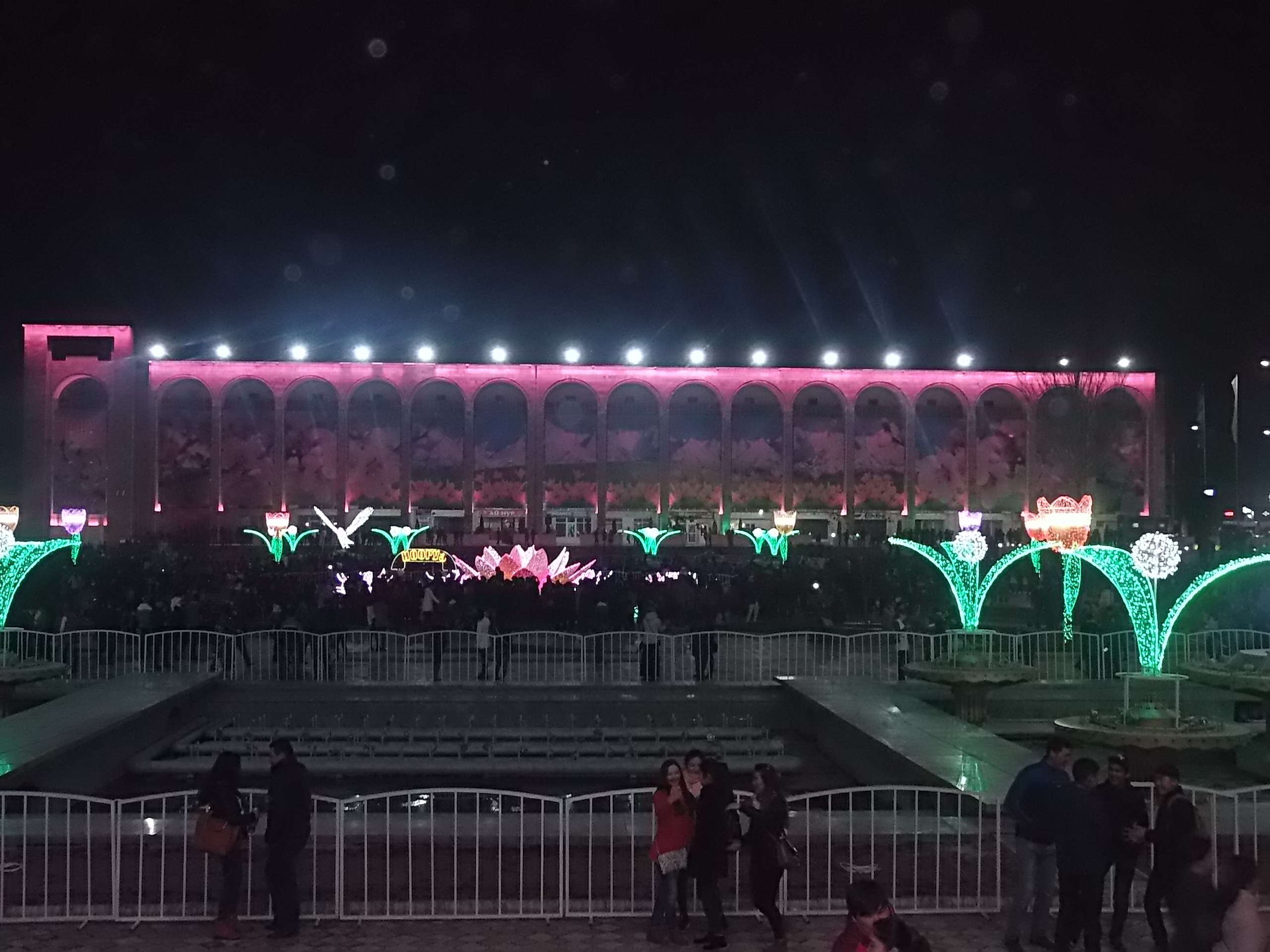 Кыргызча: Ала-Тоо аянты 21.03.2017